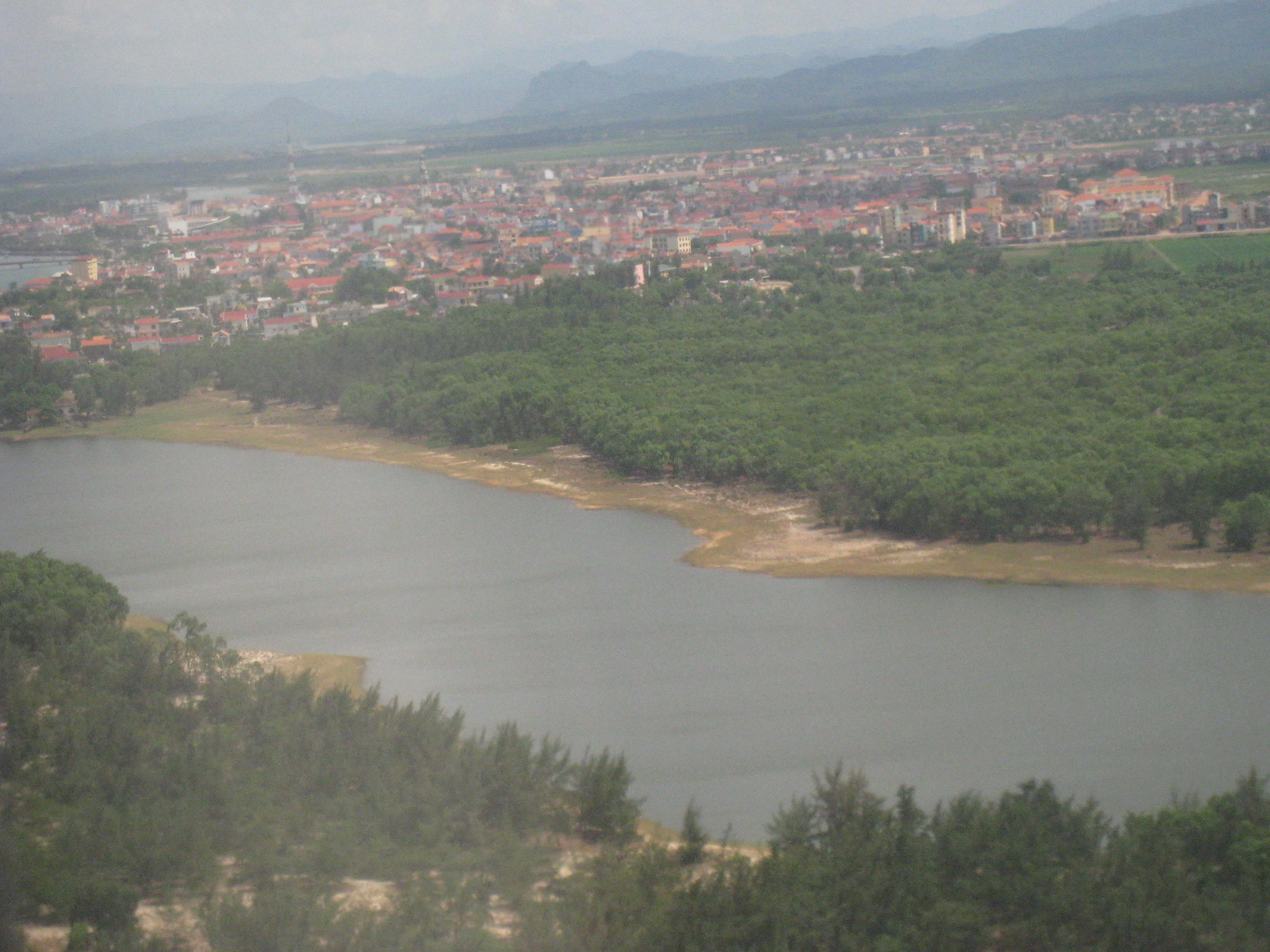 Bau Tro in Dong Hoi, Quang Binh, Vietnam